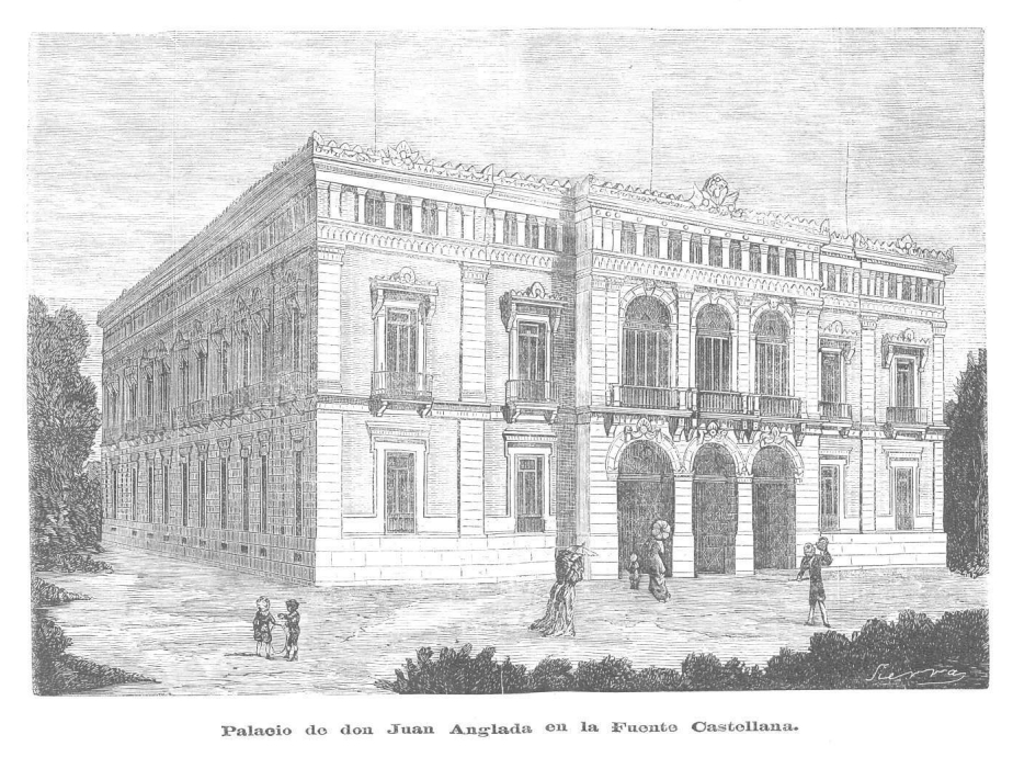 Palacio de don Juan Anglada en la Fuente Castellana, en El Globo.